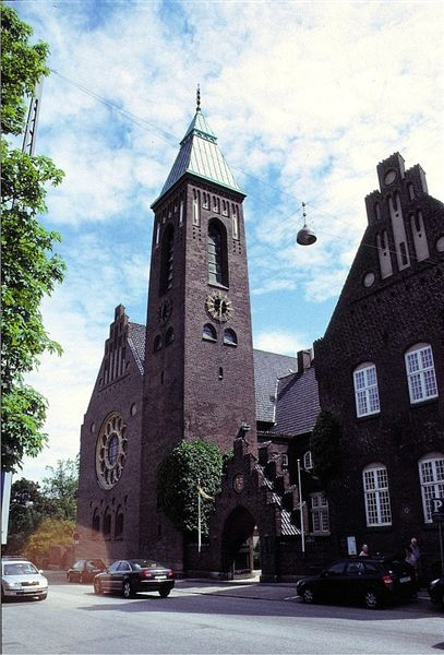 Gustafskirken i Danmark. Gustafskirken